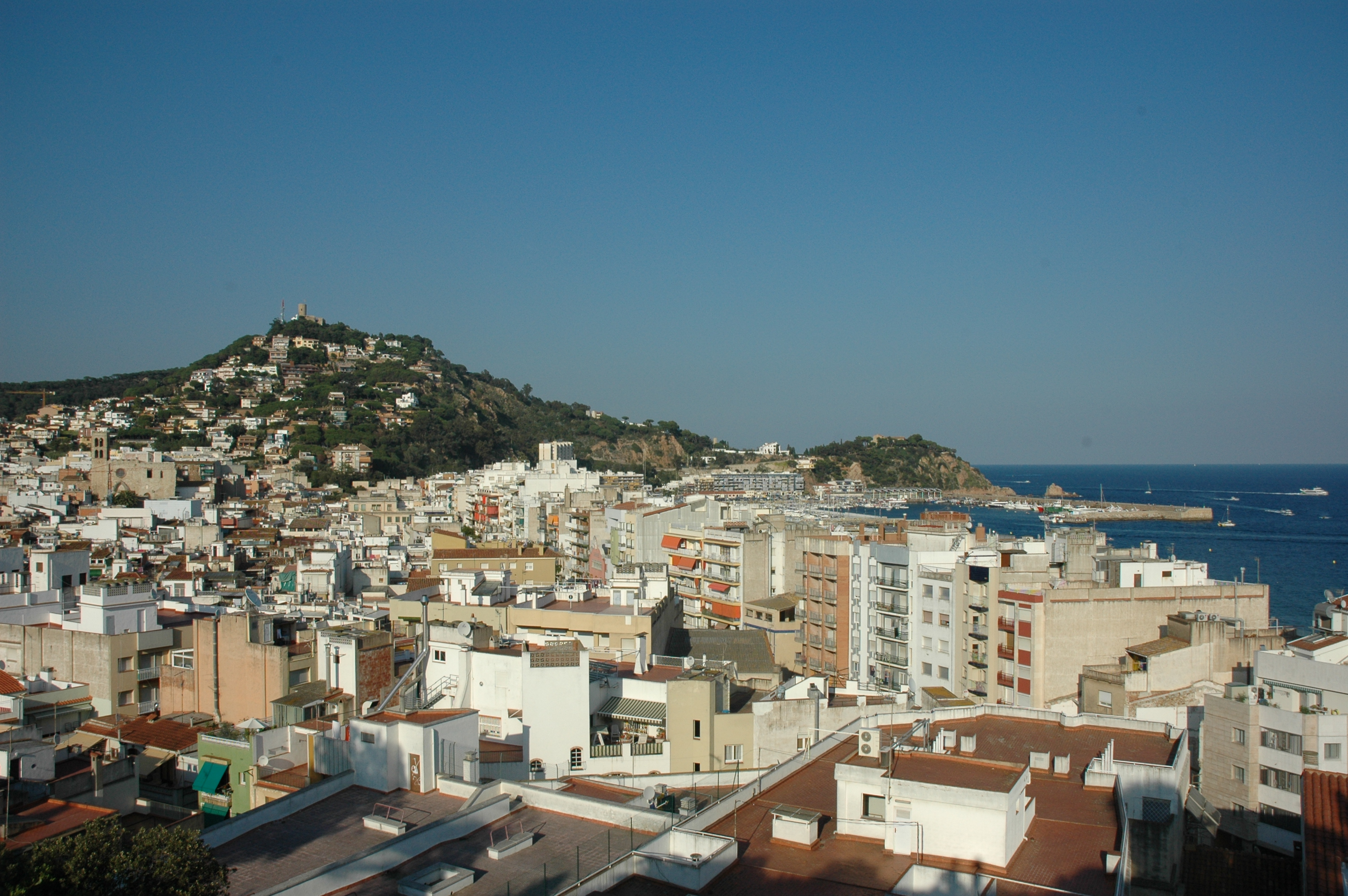 Blanes - poble